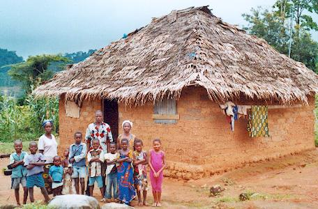 Maison tradionnelle de Mantongouiné/canton OUA/ DANANE/ Côte d'Ivoire